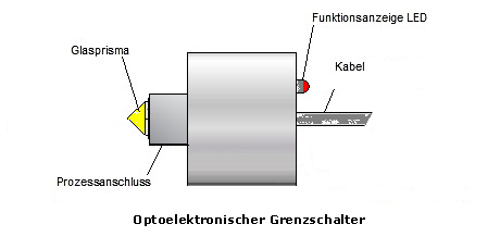 Skizze Optoelektronischer Grenzschalter